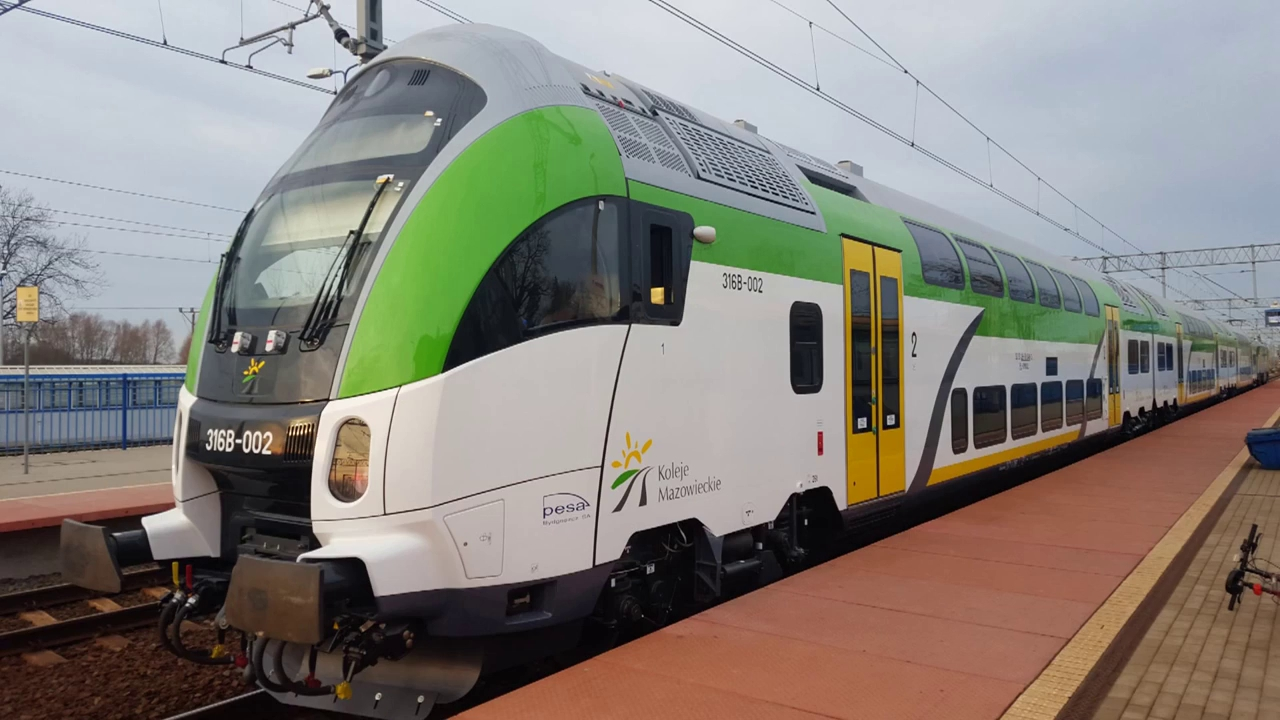 Wagon piętrowy Pesa Sundeck 316B-002 na końcu składu 111Eb-001+416B-006+416B-007+316B-002 po skończonych testach na torze doświadczalnym Instytutu Kolejnictwa w Węglewie pod Żmigrodem.